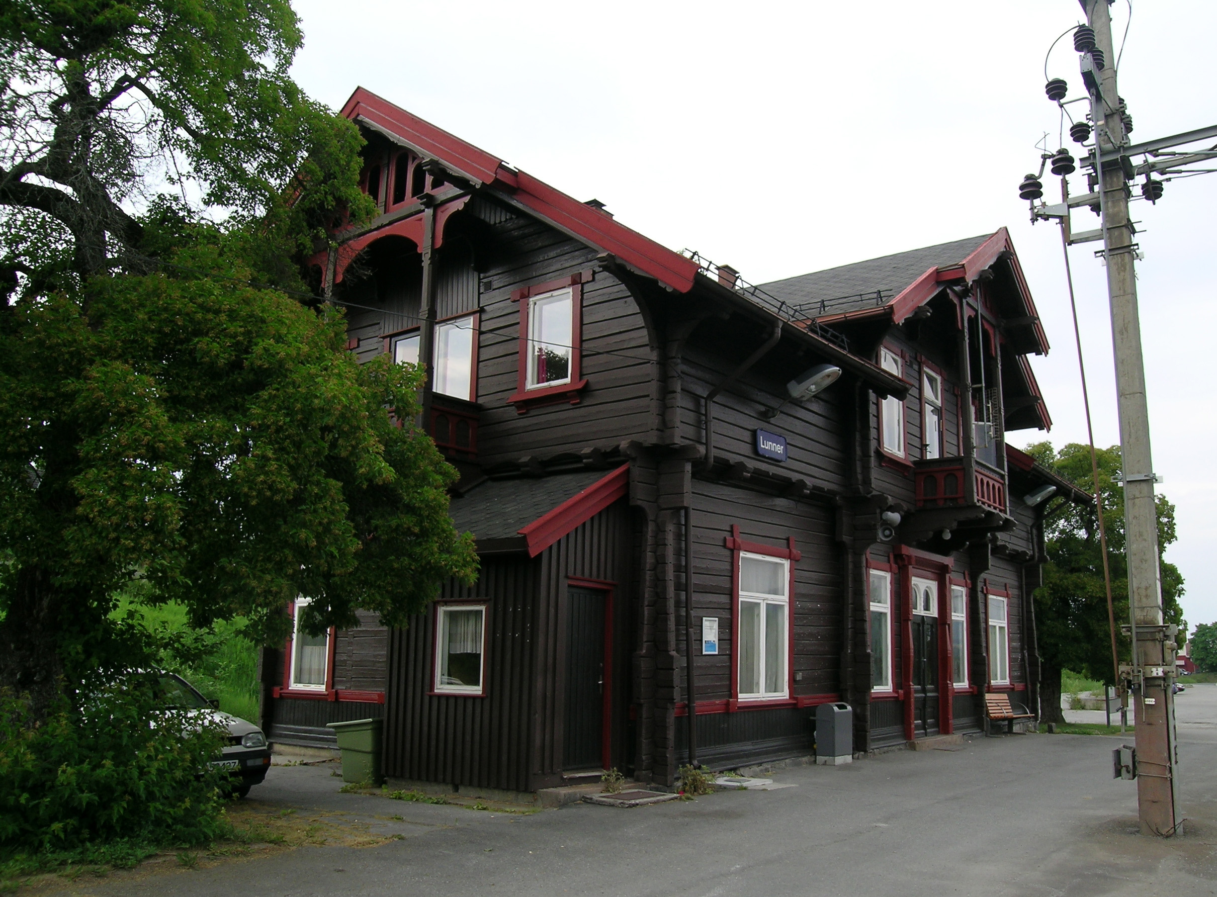 Lunner station, Gjøvikbanen. Lunner, Norway